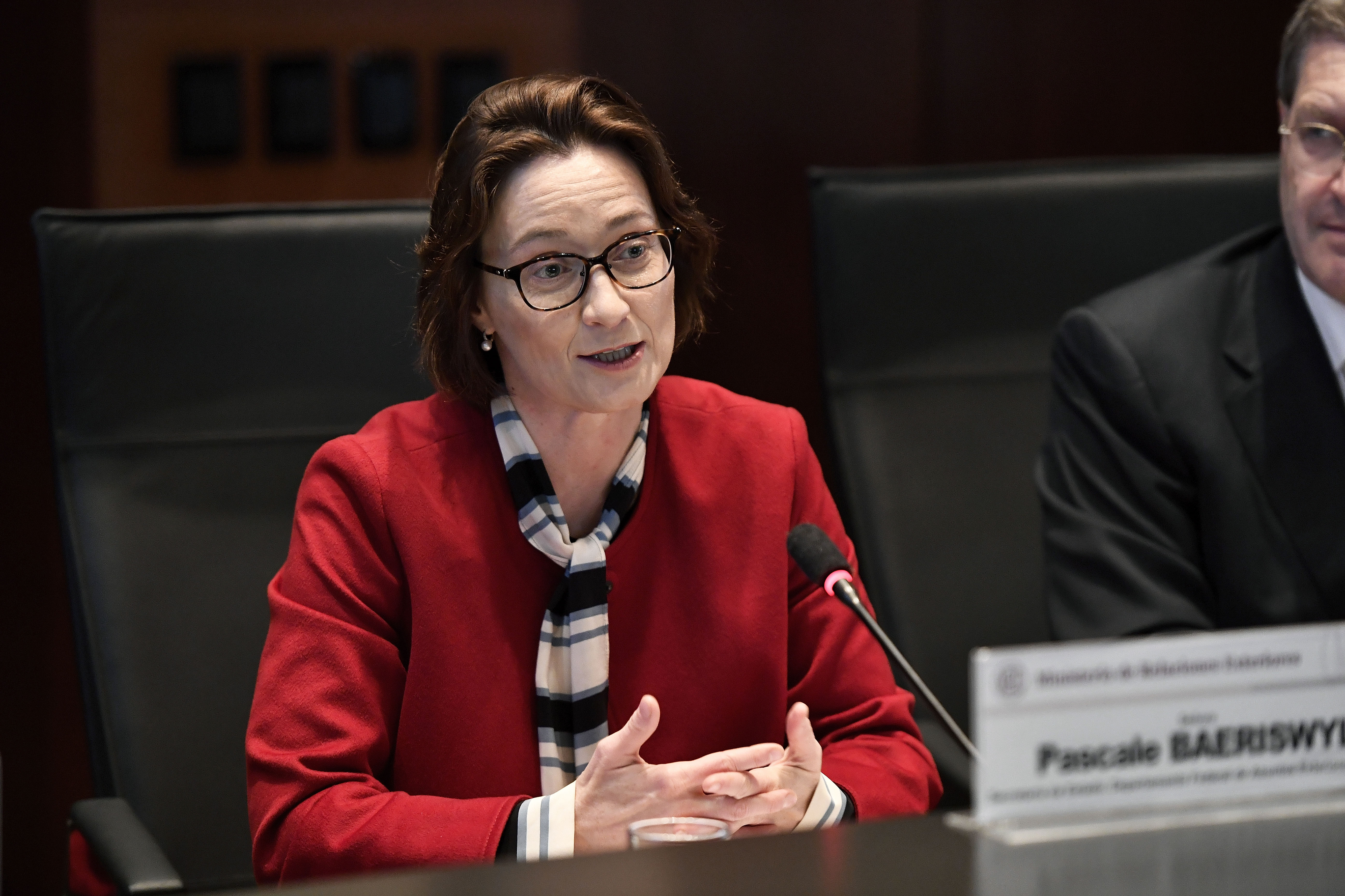 VI Reunión del Mecanismo de Consultas Bilaterales Perú-Suiza, presidida por el Vicecanciller Hugo De Zela y la Secretaria de Estado del Departamento Federal de Asuntos Exteriores de la Confederación Suiza Pascale Baeriswyl.